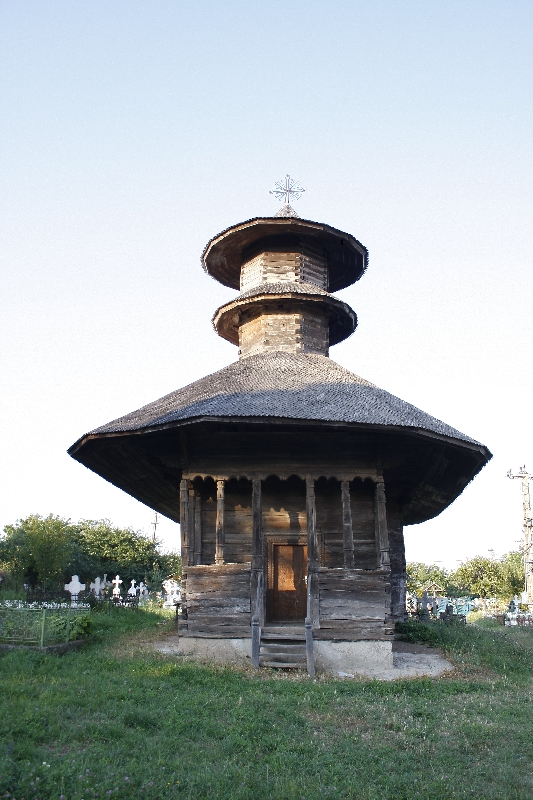 Lăcaşul de lemn de la Străoane, monument istoric clasat Cod LMI VN-II-m-A-06559, datează din veacul al XVII-lea, fiind opera meşterilor populari locali, care au depus întreaga lor măiestrie în lucrătura lemnului. Biserica de la Străoane se încadra in tezaurul de arhitectură populară romaneasca, fiind o simbioza intre stilurile arhitecturale din Moldova si Transilvania.